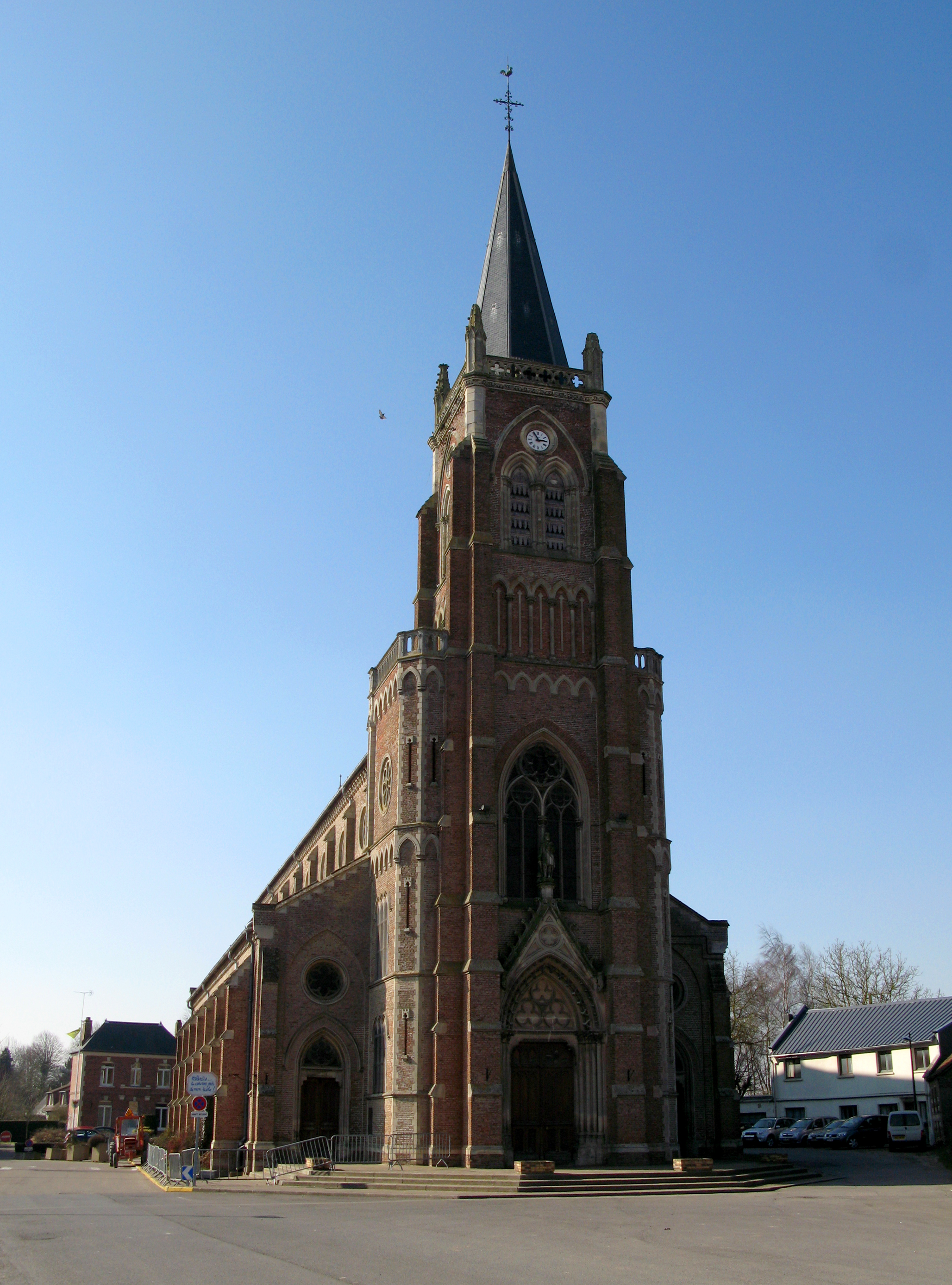 Flesselles (Somme, France) - L'église. L'édifice néo-gothique commence en mars 2010 à souffrir du temps. Une barrière de sécurité en interdit l'approche latérale. Par ailleurs, les deux pinacles frontaux du clocher ont manifestement perdu des pierres.